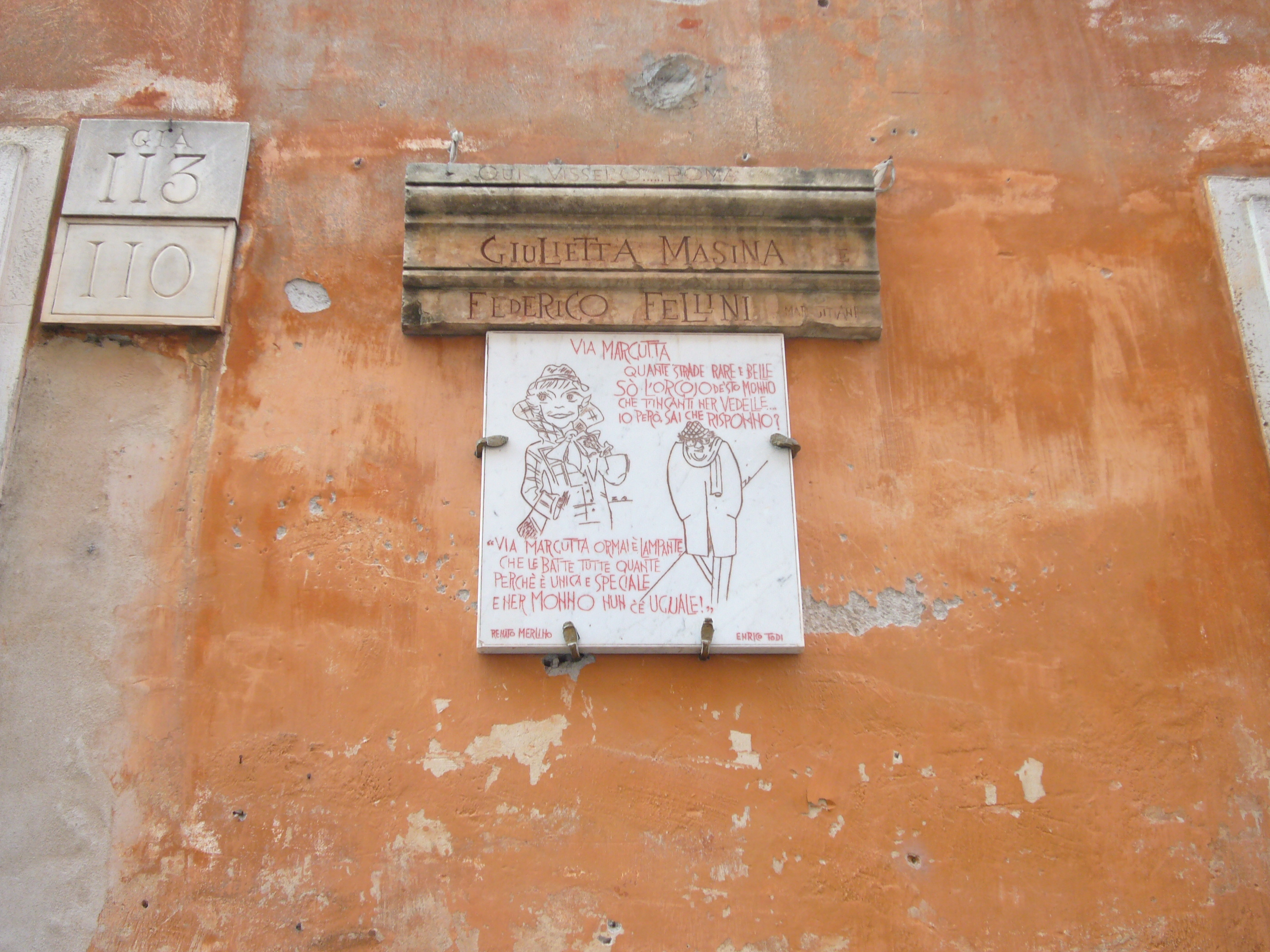 Roma, via Margutta: Memoria di Federico Fellini e Giulietta Masina sulla casa in cui abitarono